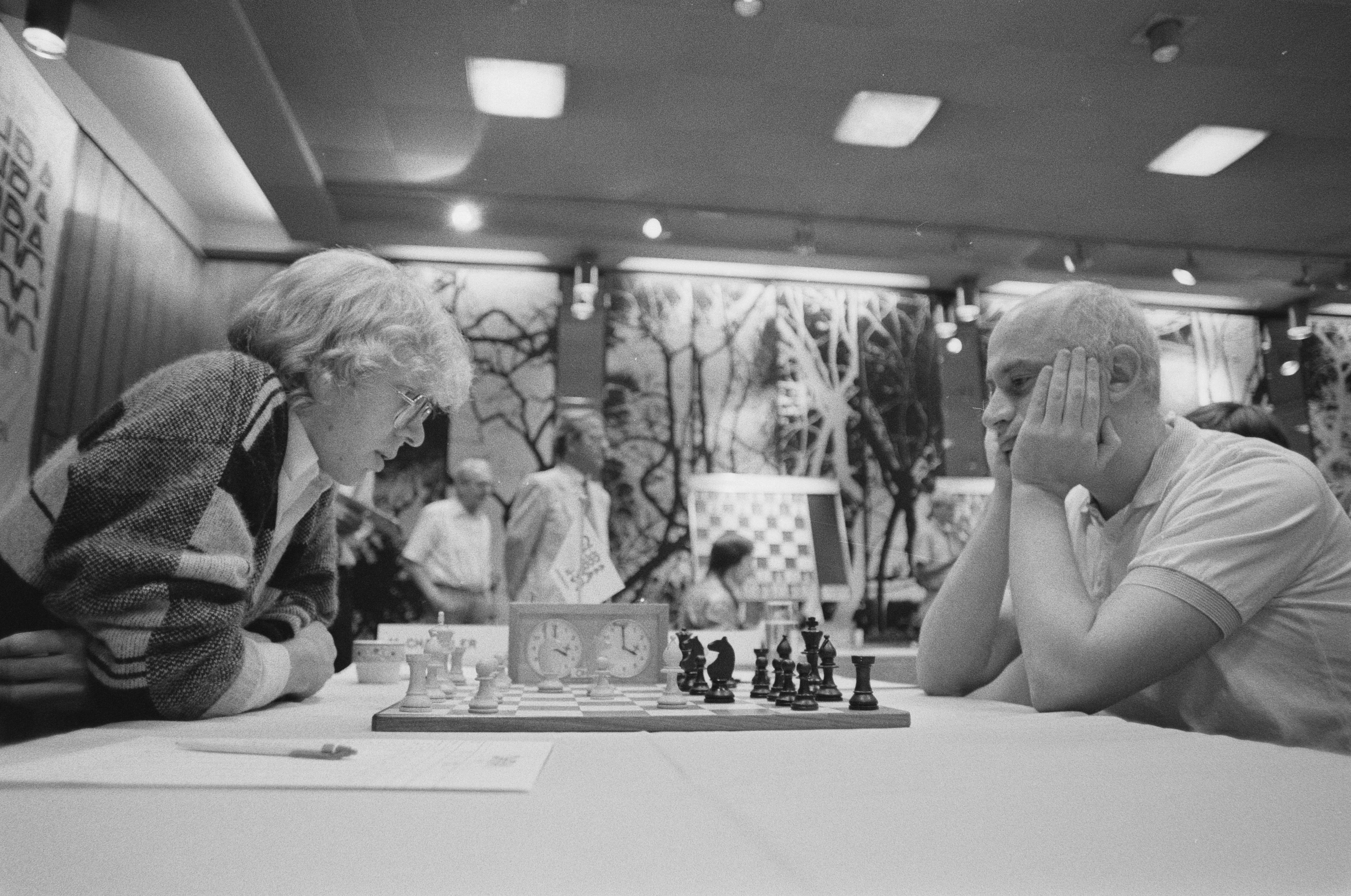 Collectie / Archief : Fotocollectie Anefo Reportage / Serie : [ onbekend ] Beschrijving : Ohra schaaktoernooi in Amsterdam; Chandler tegen Goelko Datum : 13 augustus 1987 Locatie : Amsterdam, Noord-Holland Trefwoorden : schaken Instellingsnaam : OHRA Fotograaf : Bogaerts, Rob / Anefo Auteursrechthebbende : Nationaal Archief Materiaalsoort : Negatief (zwart/wit) Nummer archiefinventaris : bekijk toegang 2.24.01.05 Bestanddeelnummer : 934-0492